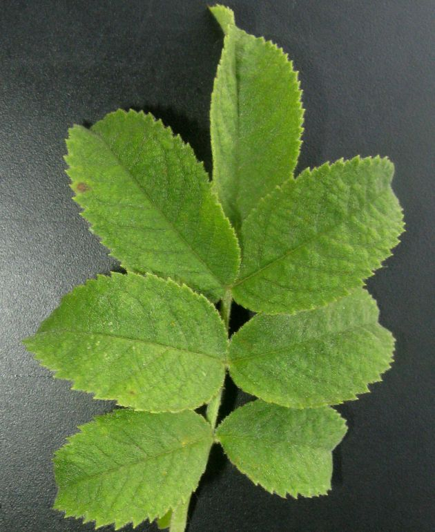 osa sherardii